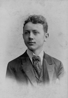 Josef Richard Marek (1883 - 1951), Český kreslíř, grafik, překladatel a spisovatel.